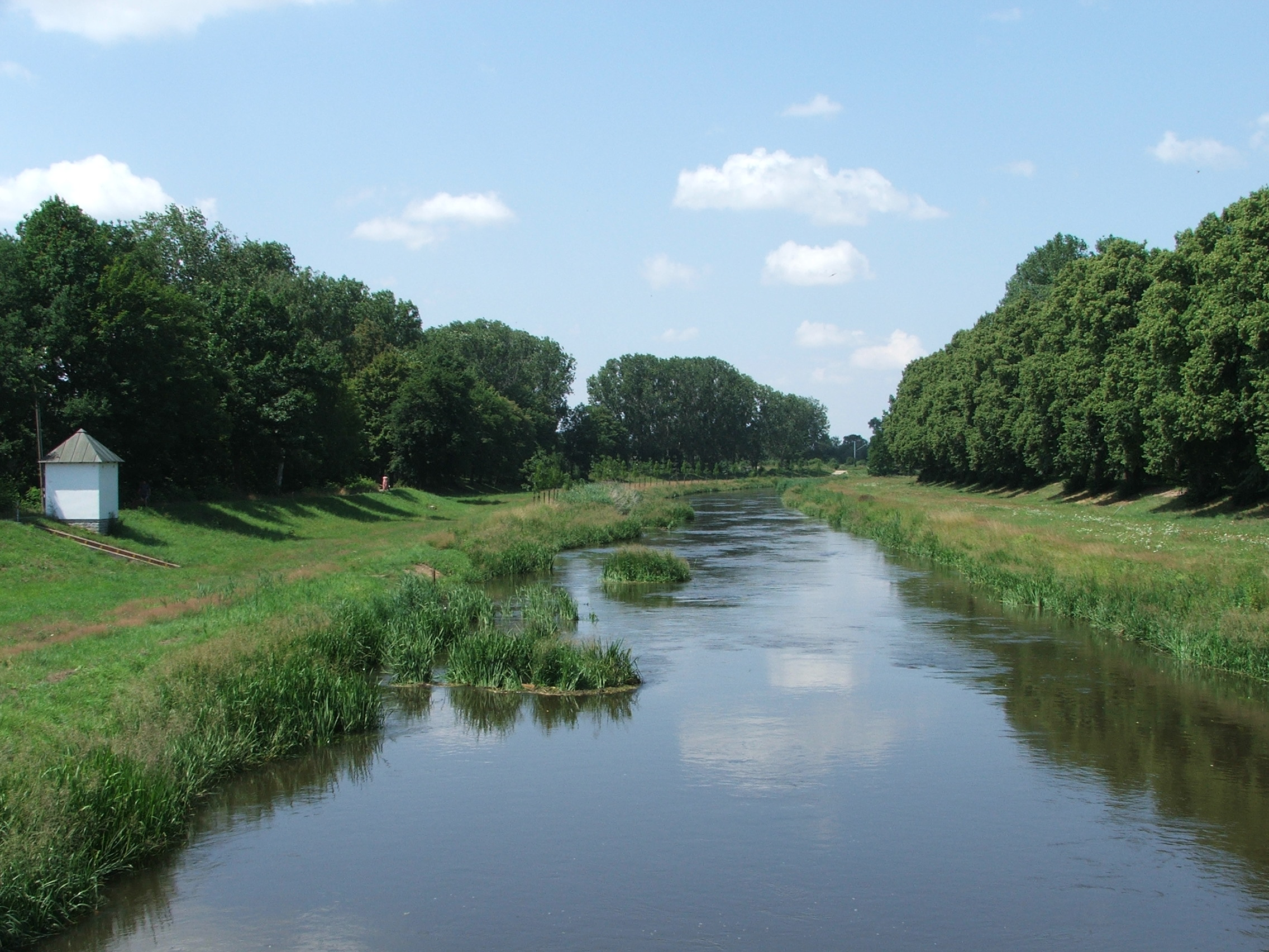 River "Schwarze Elster" in Bad Liebenwerda